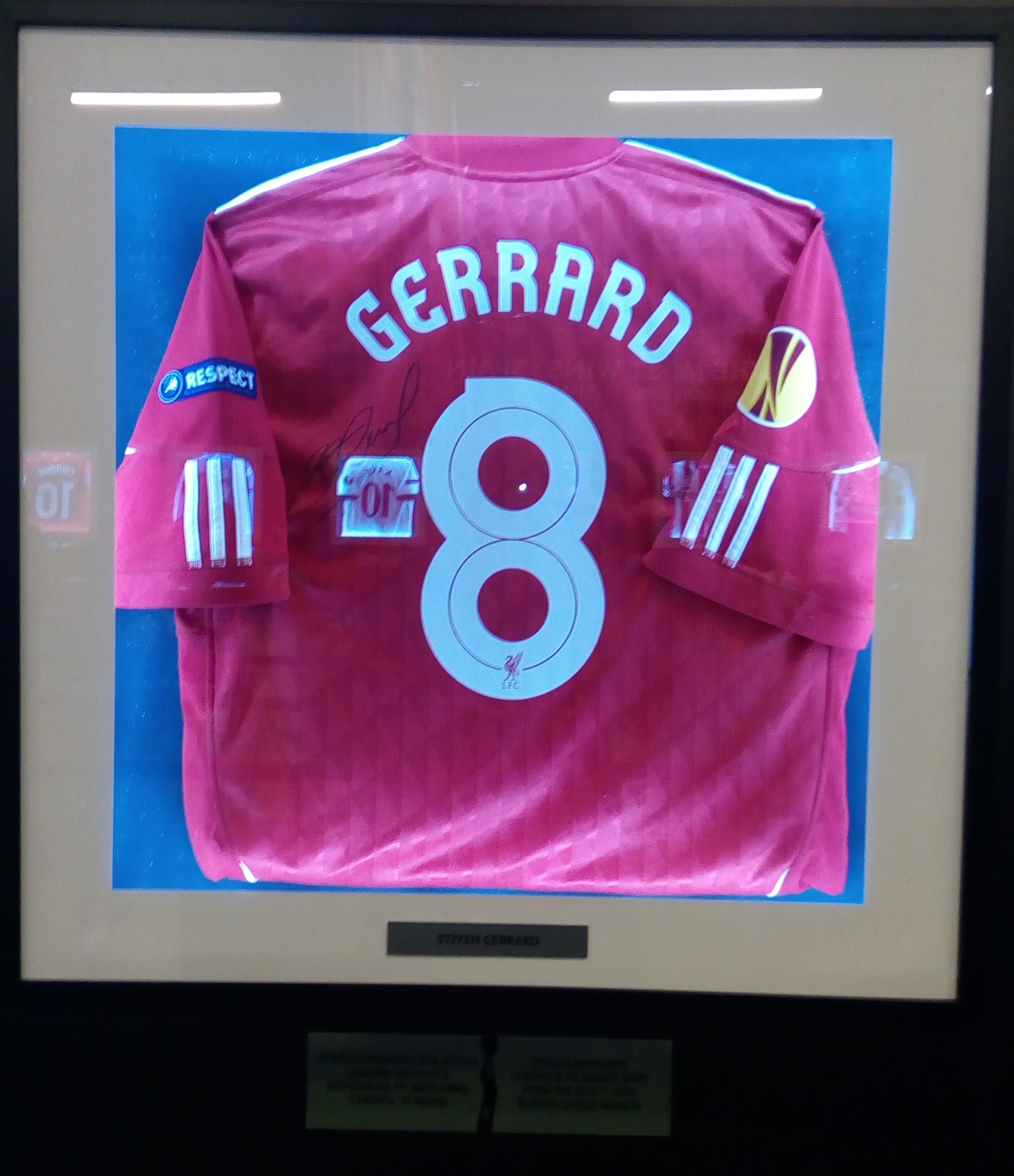 Avropa Liqası Muzeyi Bakıda